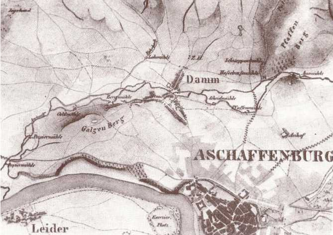 Damm, Stadtteil von Aschaffenburg um 1839